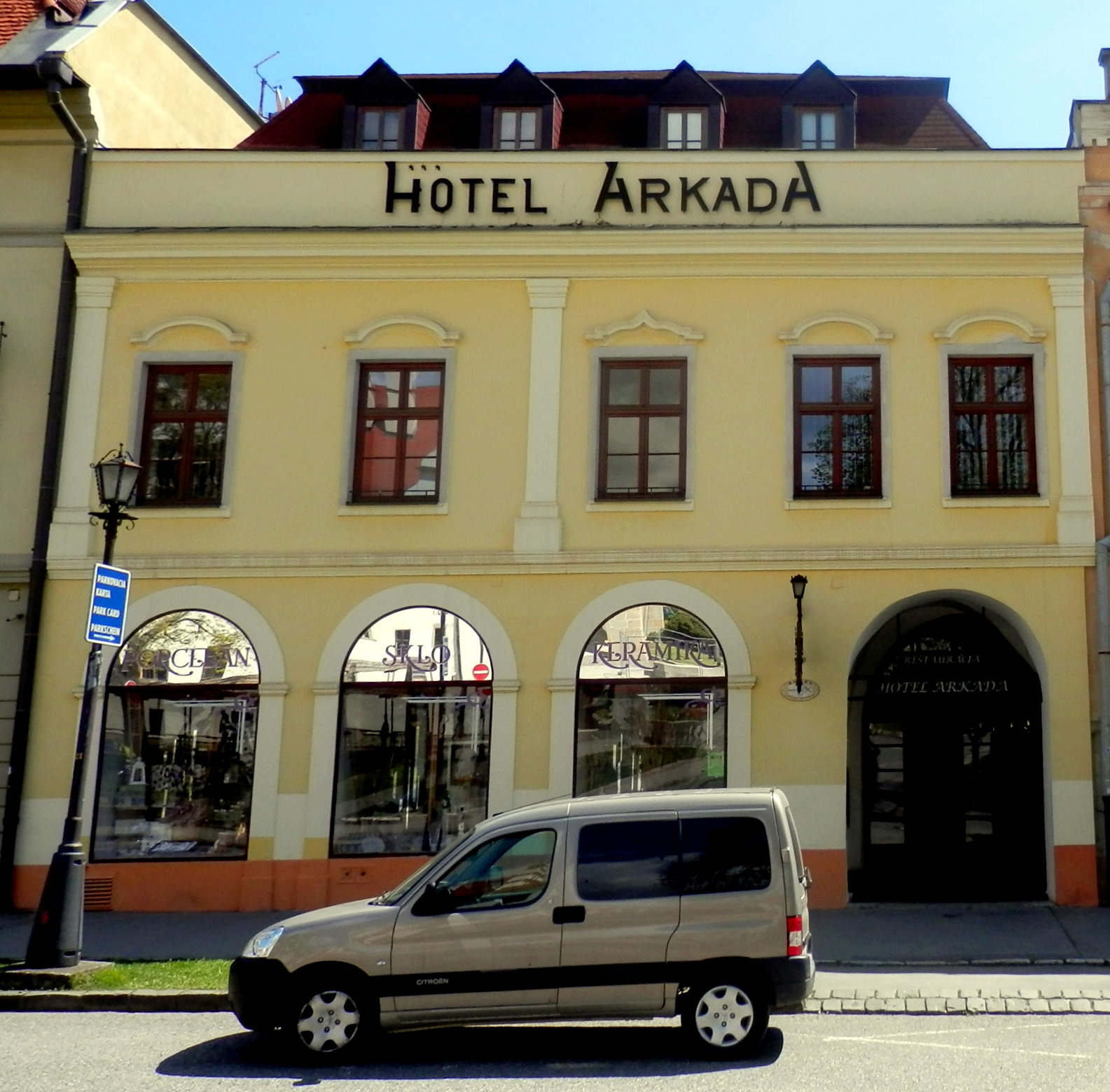 Dom meštiansky. (Breuerova tlačiareň ) Doba vzniku 14.storočie. Prevládajúci sloh- neskorogotický. Mestská pamiatková rezervácia. Námestie majstra Pavla číslo 26, mesto Levoča.